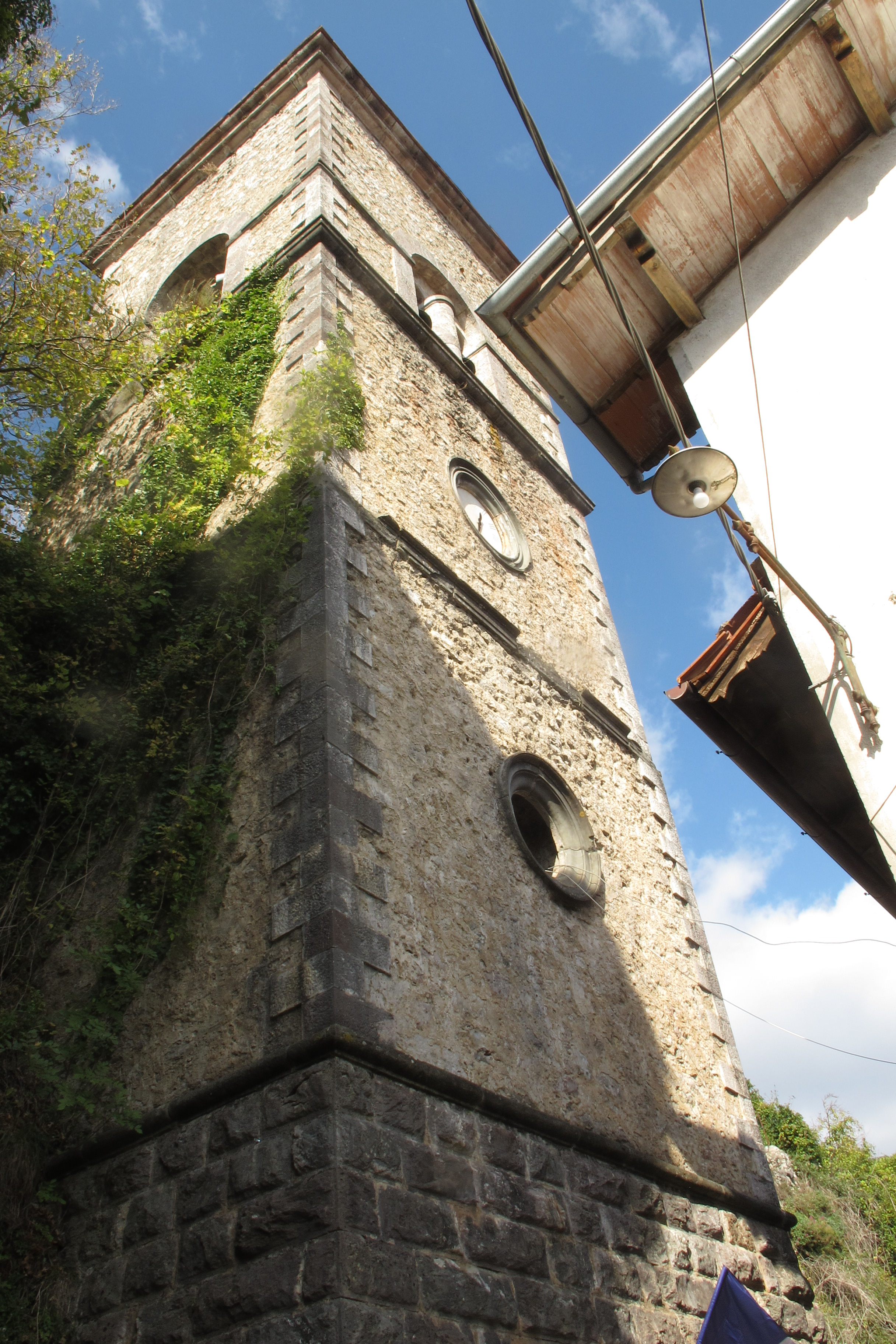 Campanile di Lucchio - Scorcio Caratteristico